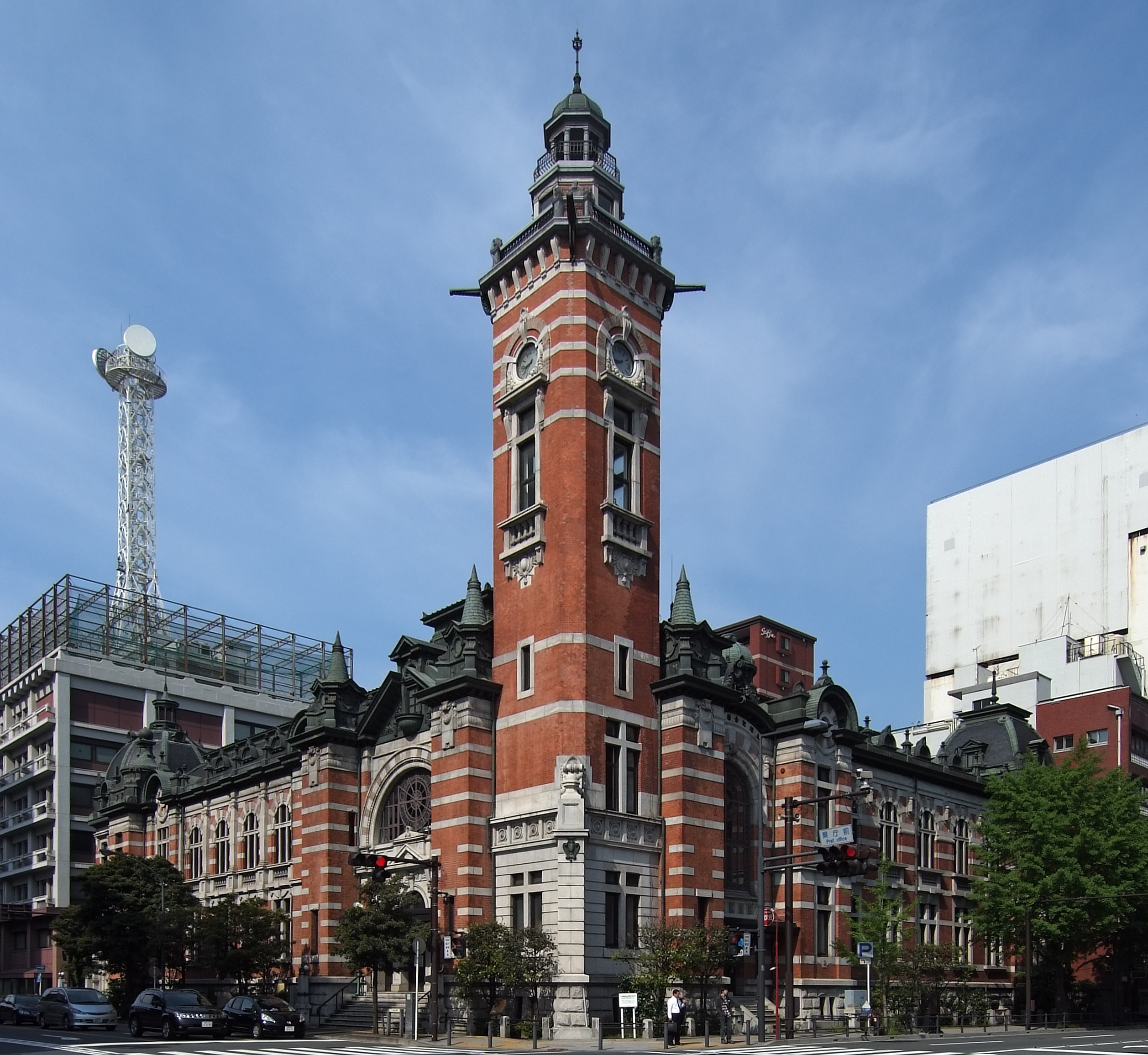 Yokohama Port Opening Memorial Hall (Jack Tower), at Naka-ku Yokohama Japan, design by Shigeyoshi Fukuda in 1917.